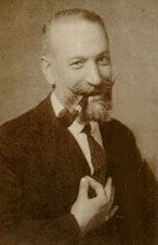 Portrait souriant du philosophe et éditeur italien Angelo Fortunato Formiggini (1878-1938).